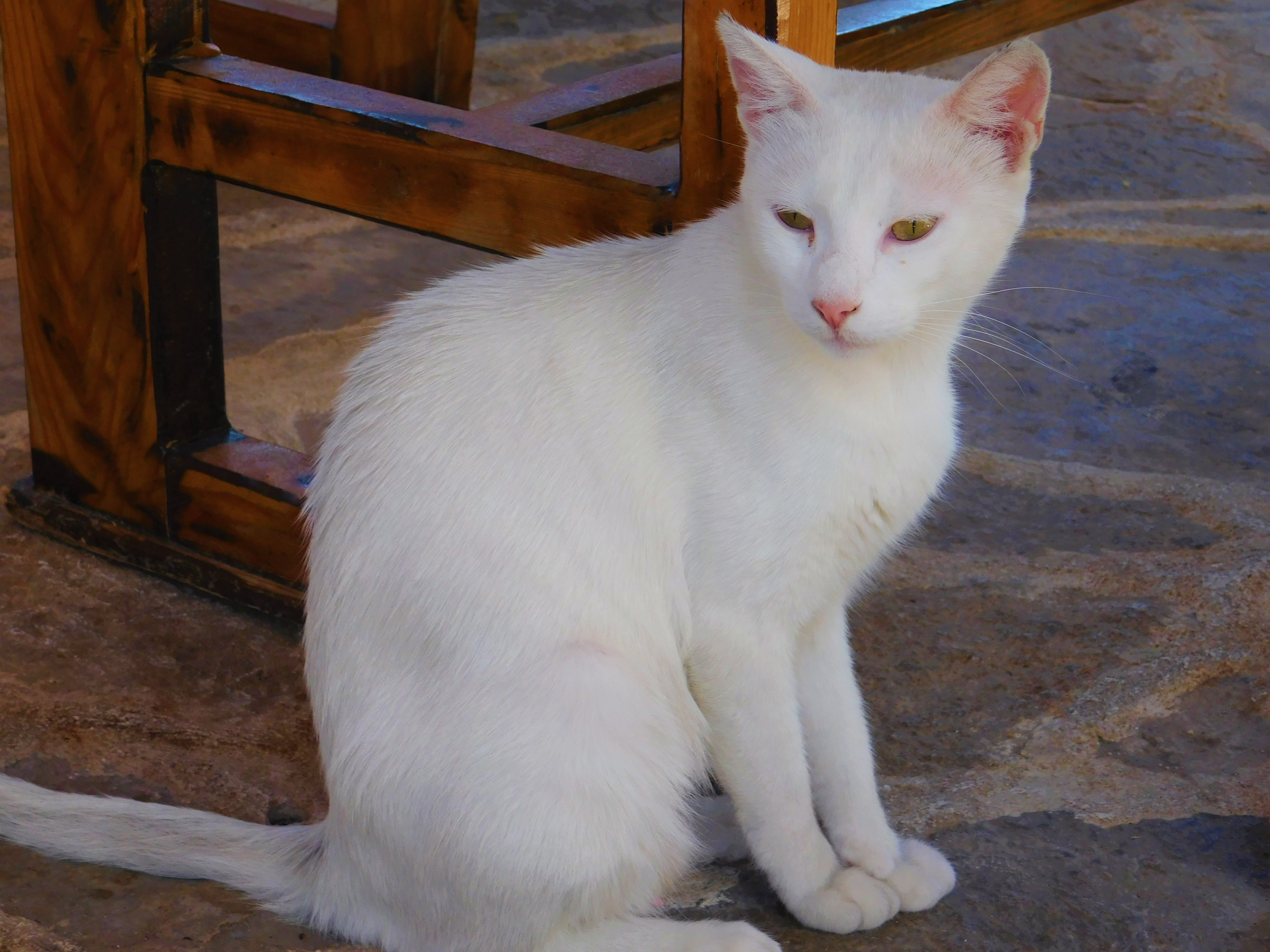 Toulavá kočka v restauraci v Drašnici